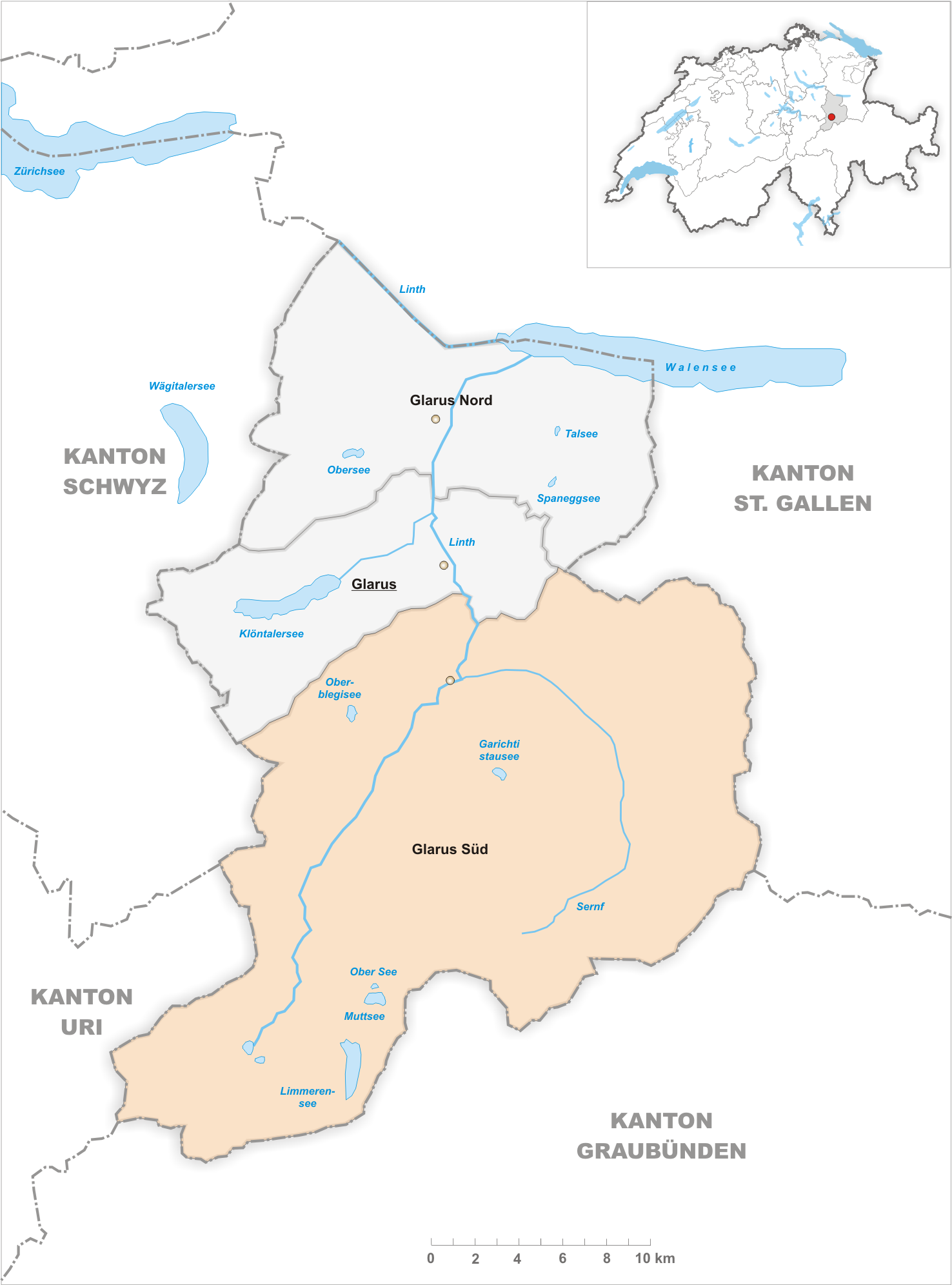 Municipality Glarus Süd